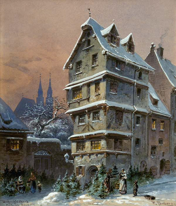 Weihnachtsabend in Nürnberg. Aquarell, signiert, rückseitig bezeichnet; 35.5 x 30.5 cm